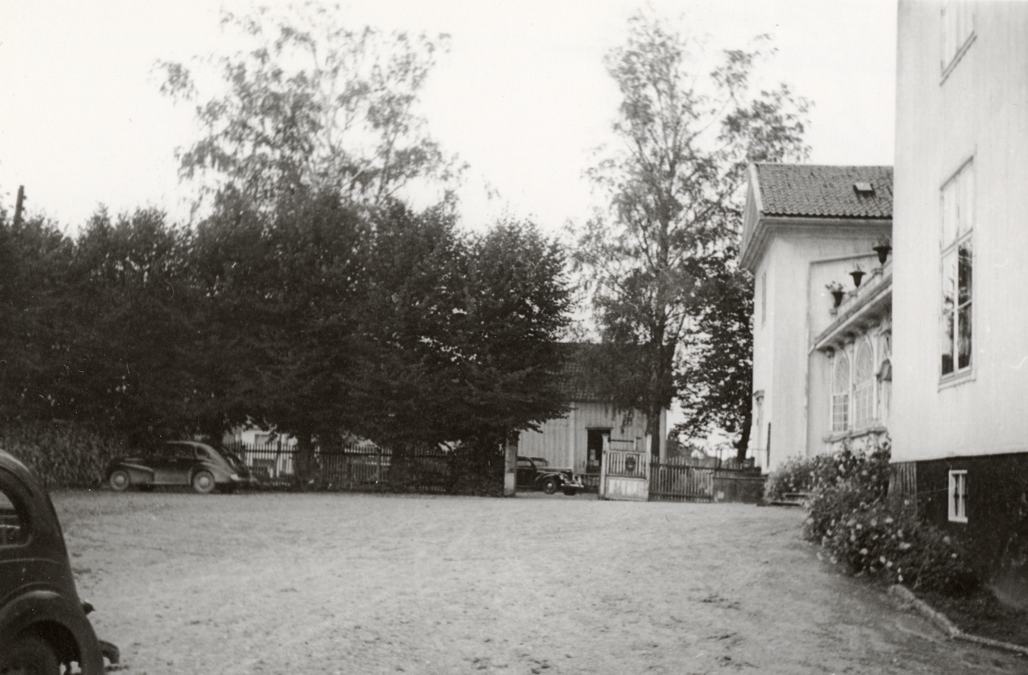 Austad i Drammen, Buskerud